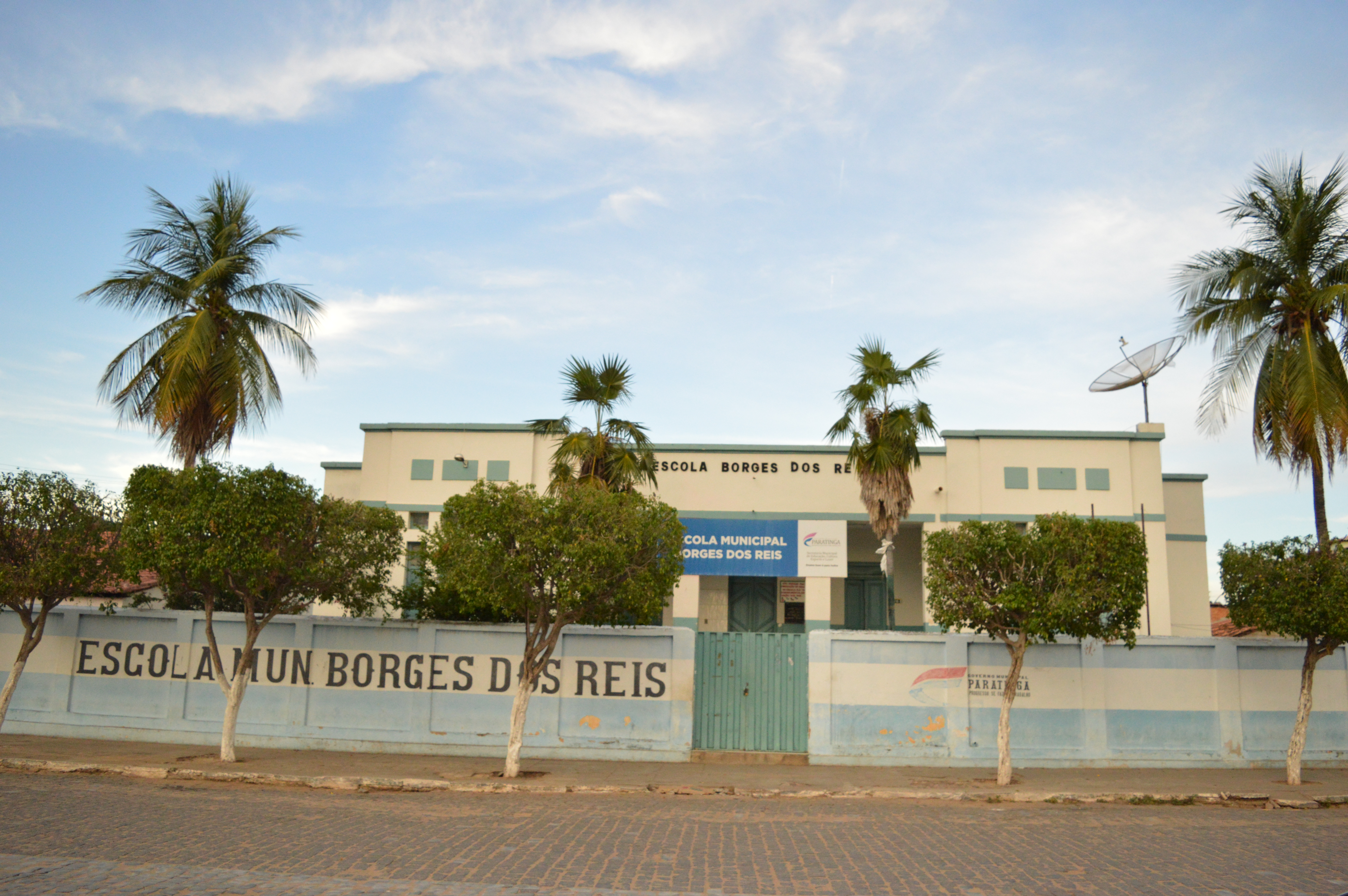 Escola Municipal Borges dos Reis, localizada em Paratinga. Foto de 16 de janeiro de 2017.